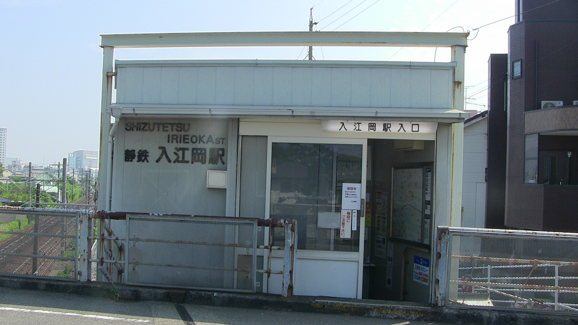 入江岡駅の駅舎